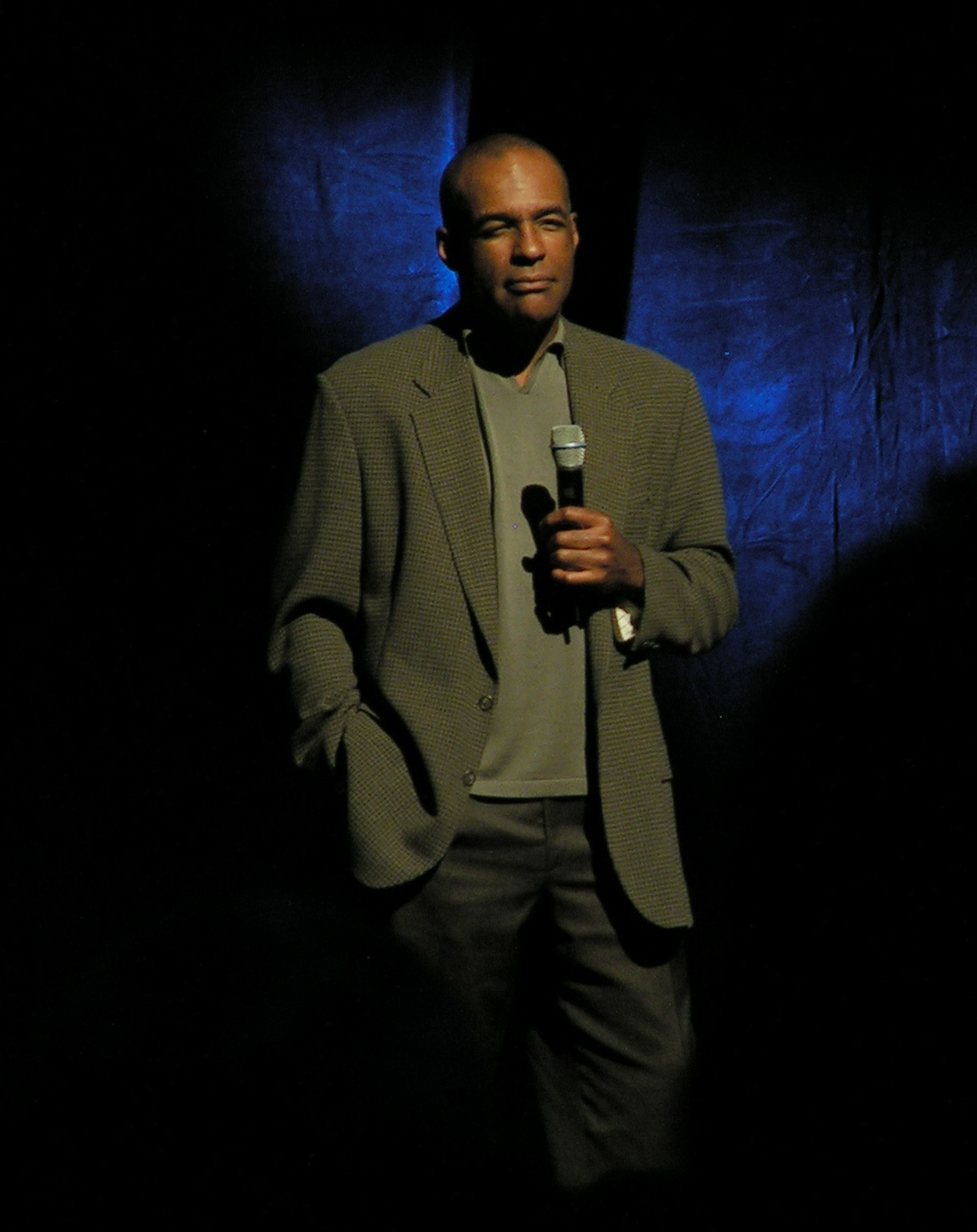 Michael Dorn auf der Galileo 7.9 Convention (2005 in Neuss, Deutschland)